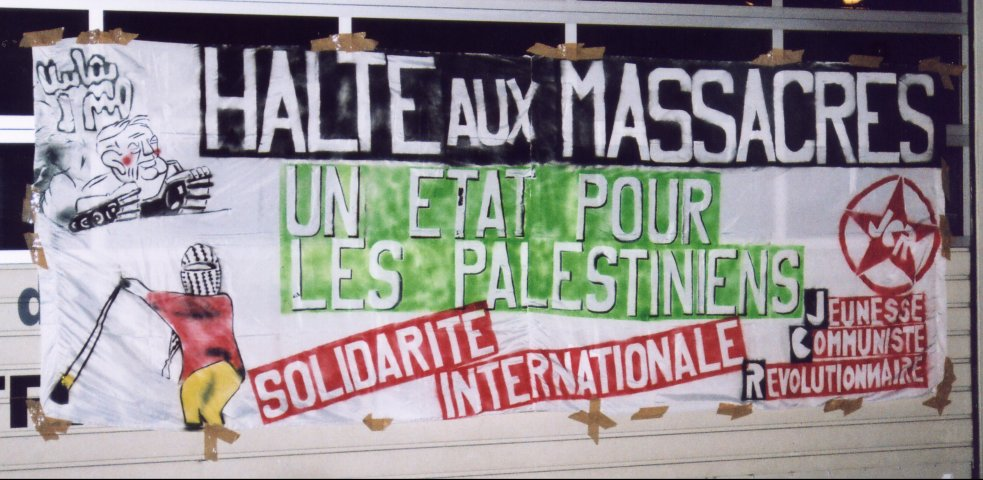 Banderolle des JCR en solidarité avec la Palestine